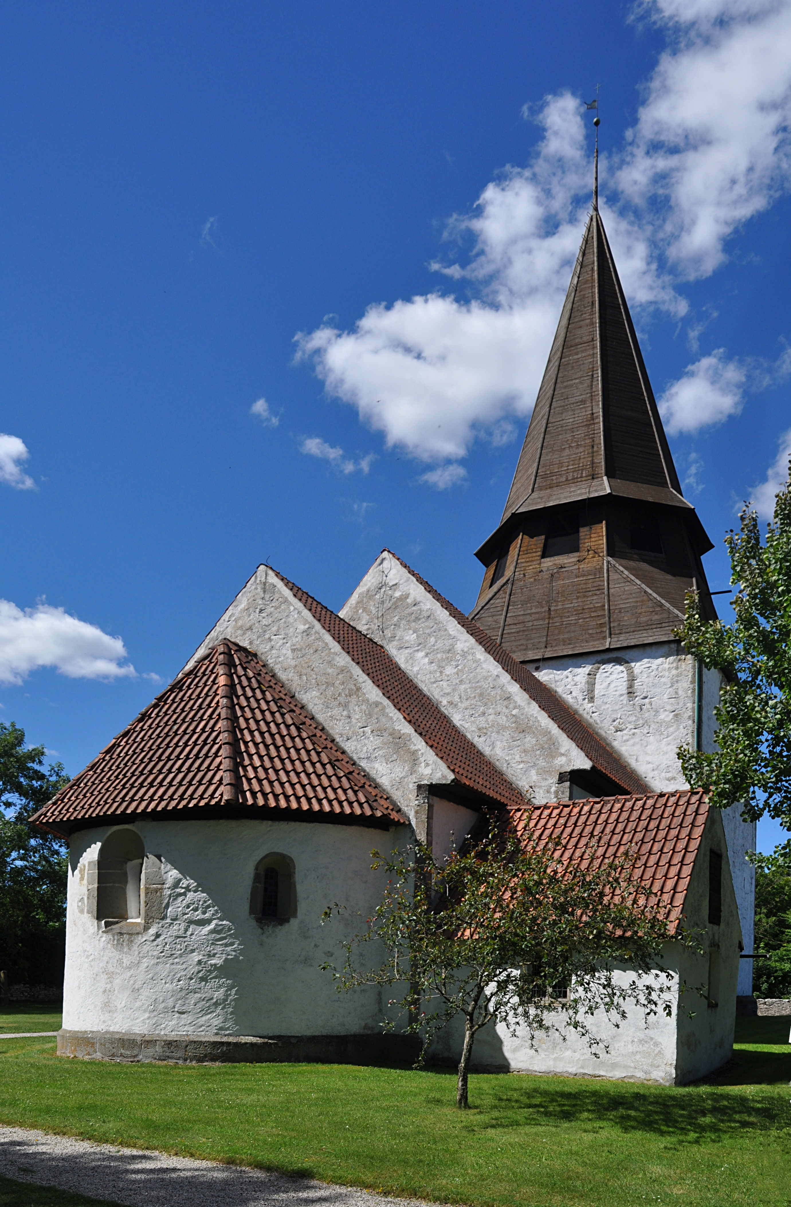 Alva kyrka (Alva Kyrkogården 1:1)